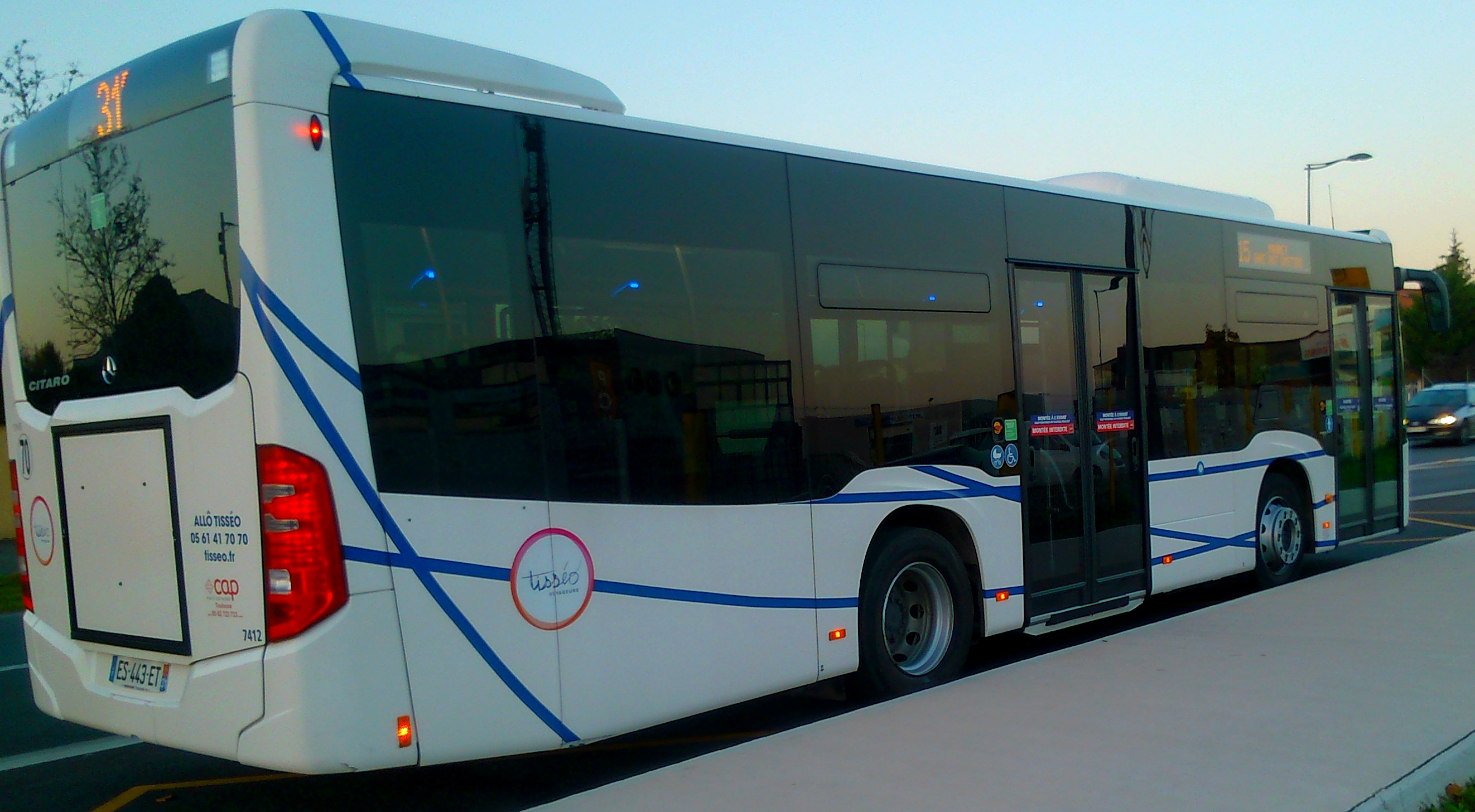 Bus Tisséo avec la nouvelle livrée des lignes du muretain, sur la ligne 315 au terminus de Saint-Lys